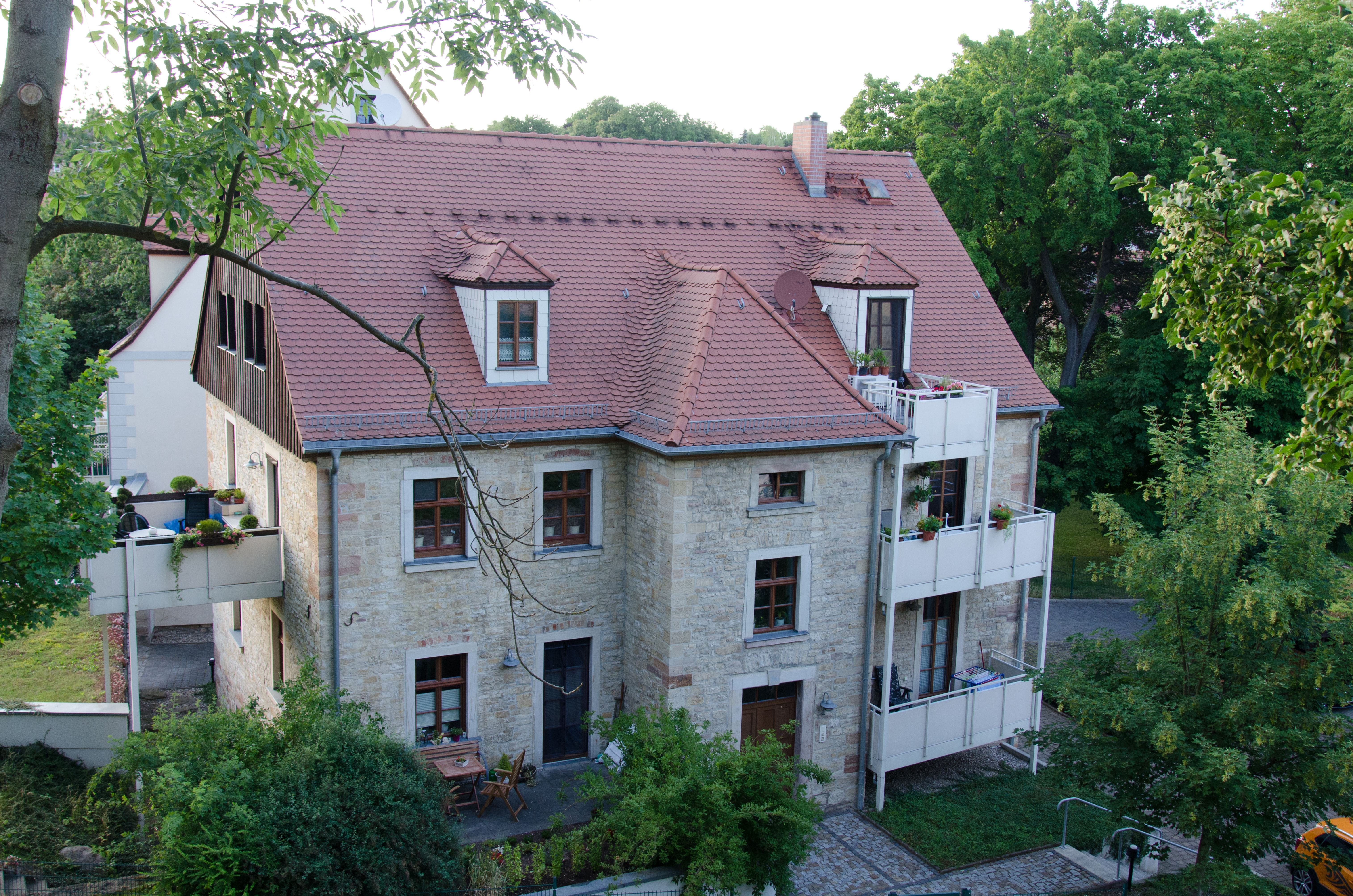 Querfurt, Hinertm Wehr 16